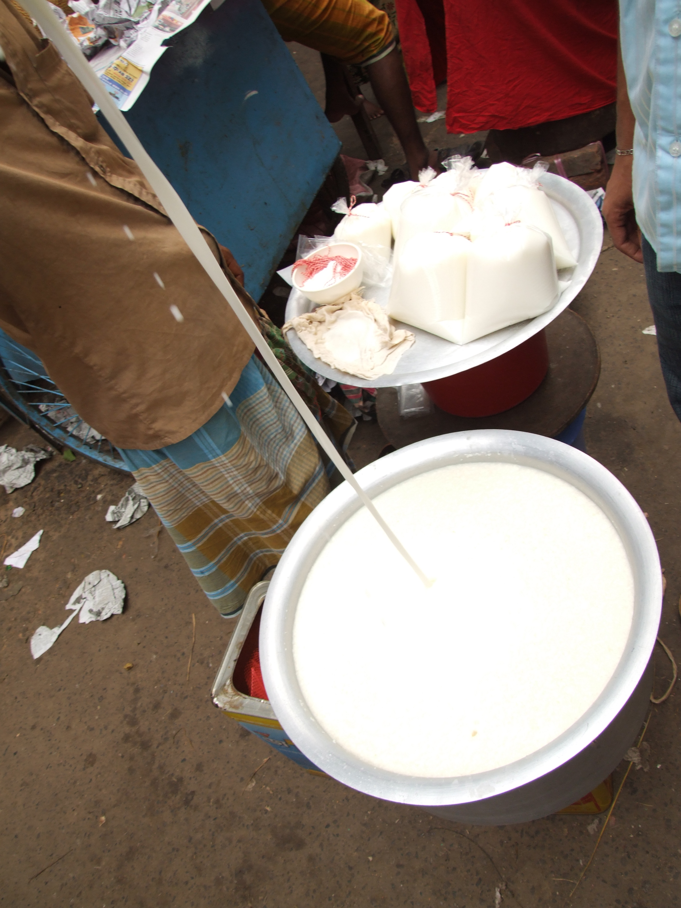 Iftar items available @ puran Dhaka